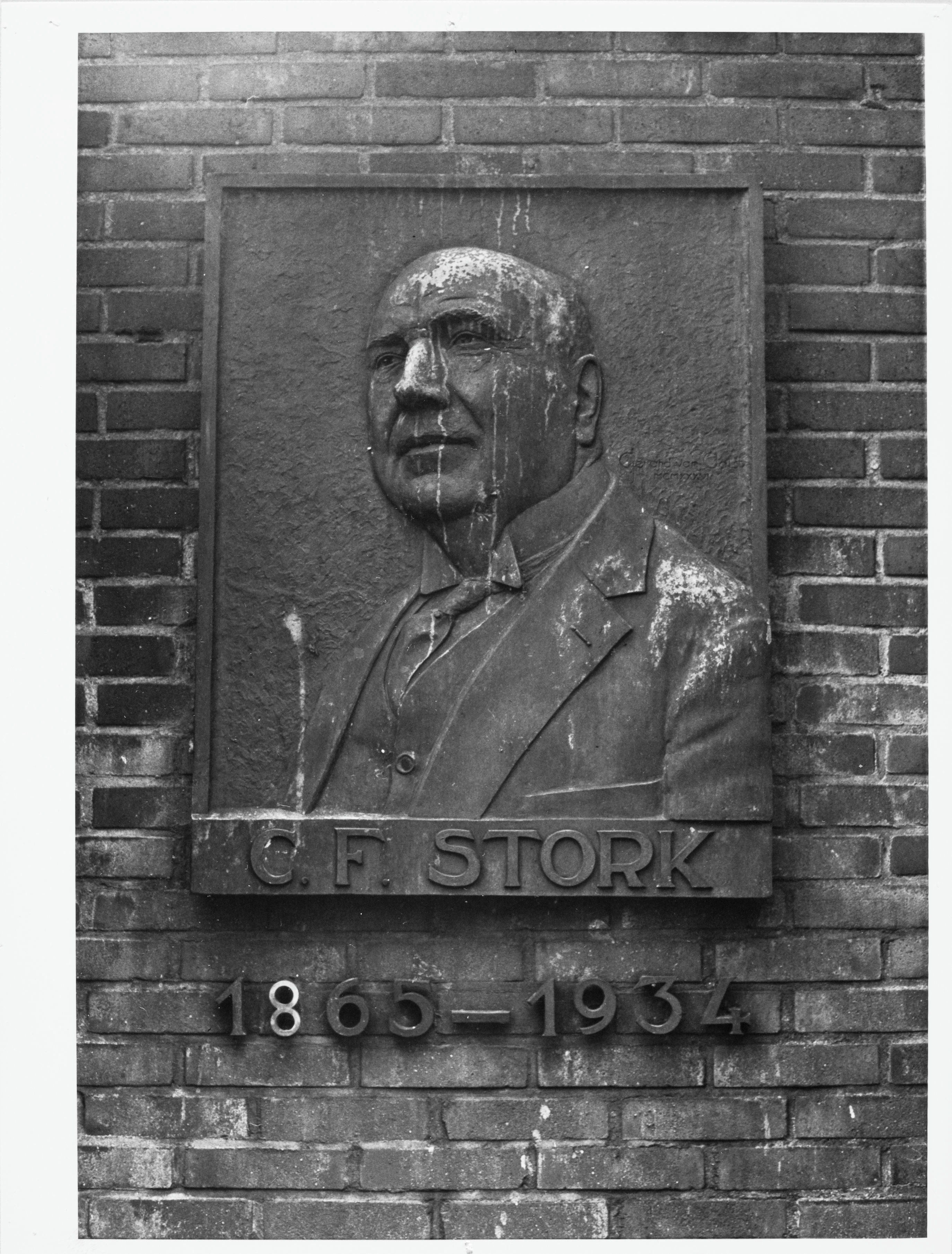 't Lansink: Overzicht van bronzen plaquette van C.F. Stork in de C.F. Storkstraat op de hoek met de Julianalaan (opmerking: Afdrukken verkregen via Ypie Attema, oud medewerkster van de Rijksdienst voor de Monumentenzorg.)